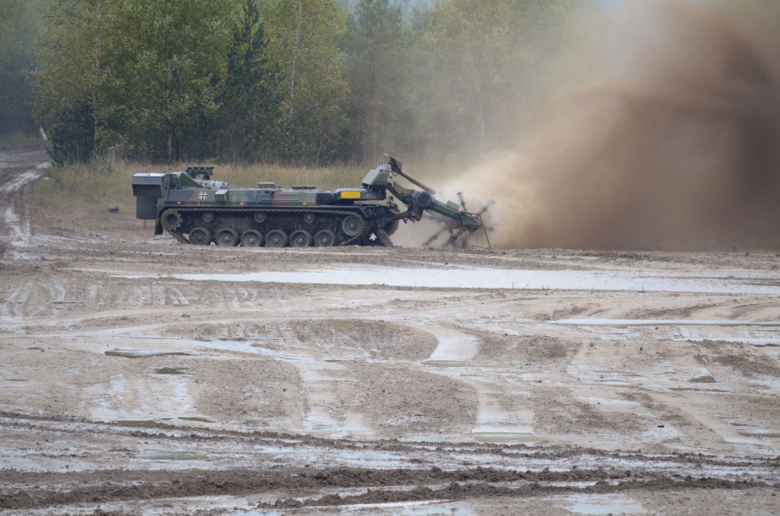 Eine Informationslehrübung (ILÜ) der Bundeswehr am 24.09.2012 in Bergen-Hohne Training Area.